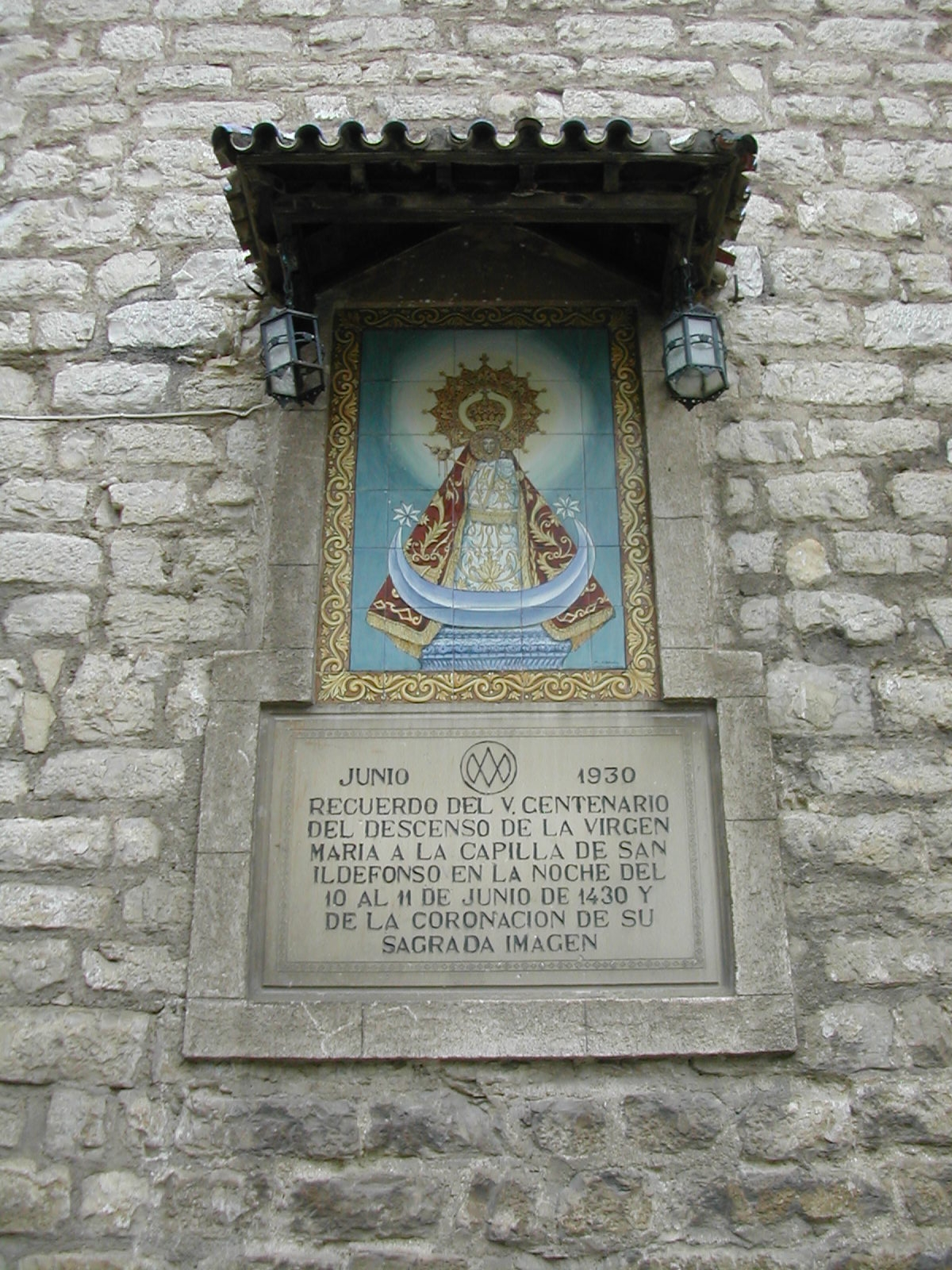 Mosaico de la Virgen de la Capilla en la fachada renacentista de la Iglesia de San Ildefonso de Jaén.